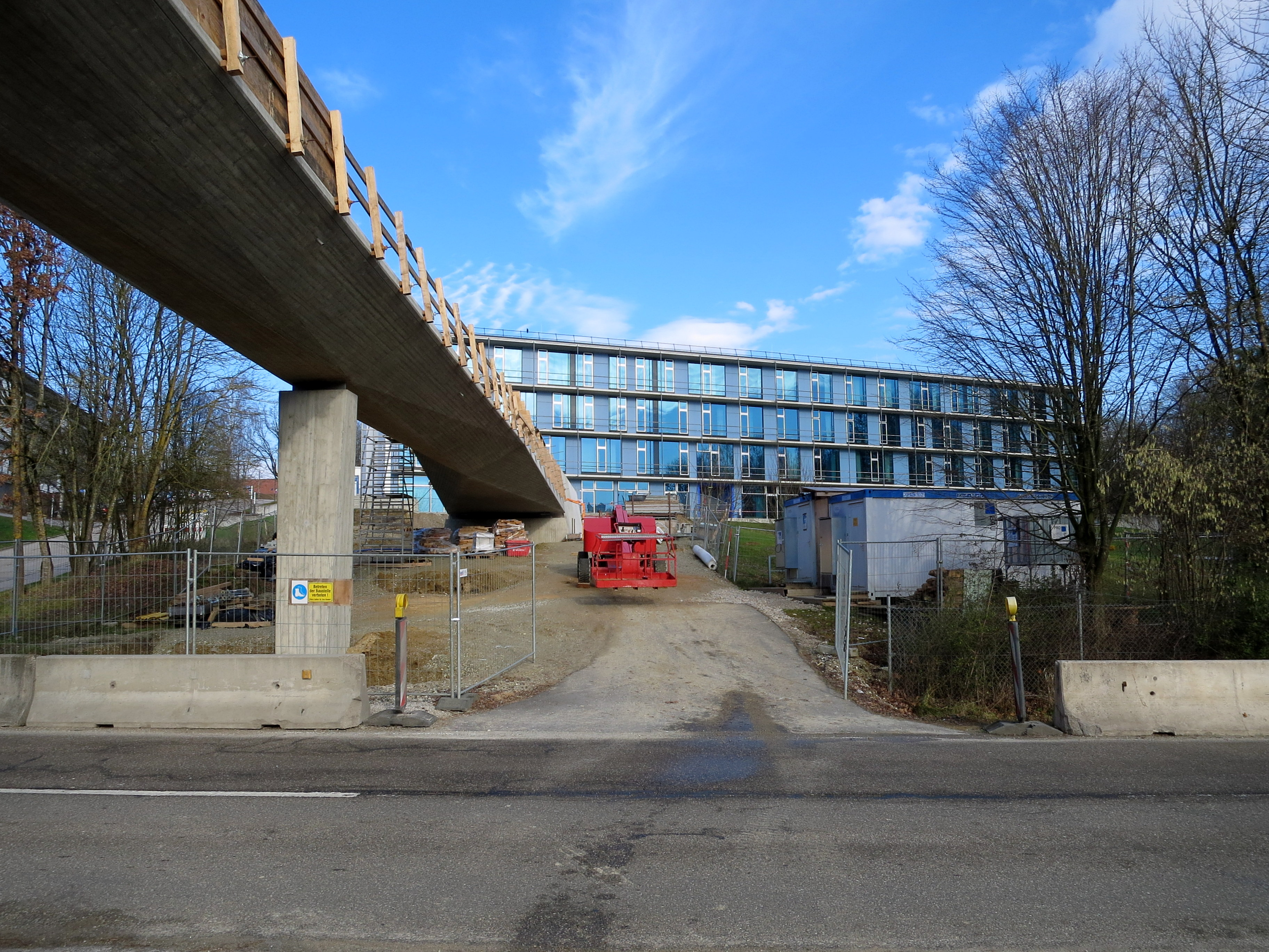 Die Brücke verbindet die Institute nördlich der Thalhauser Straße mit dem Campus-Zentrum